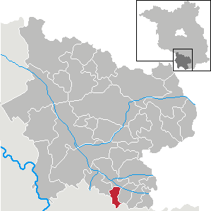 Merzdorf in Brandenburg (Country) - District Elbe-Elster